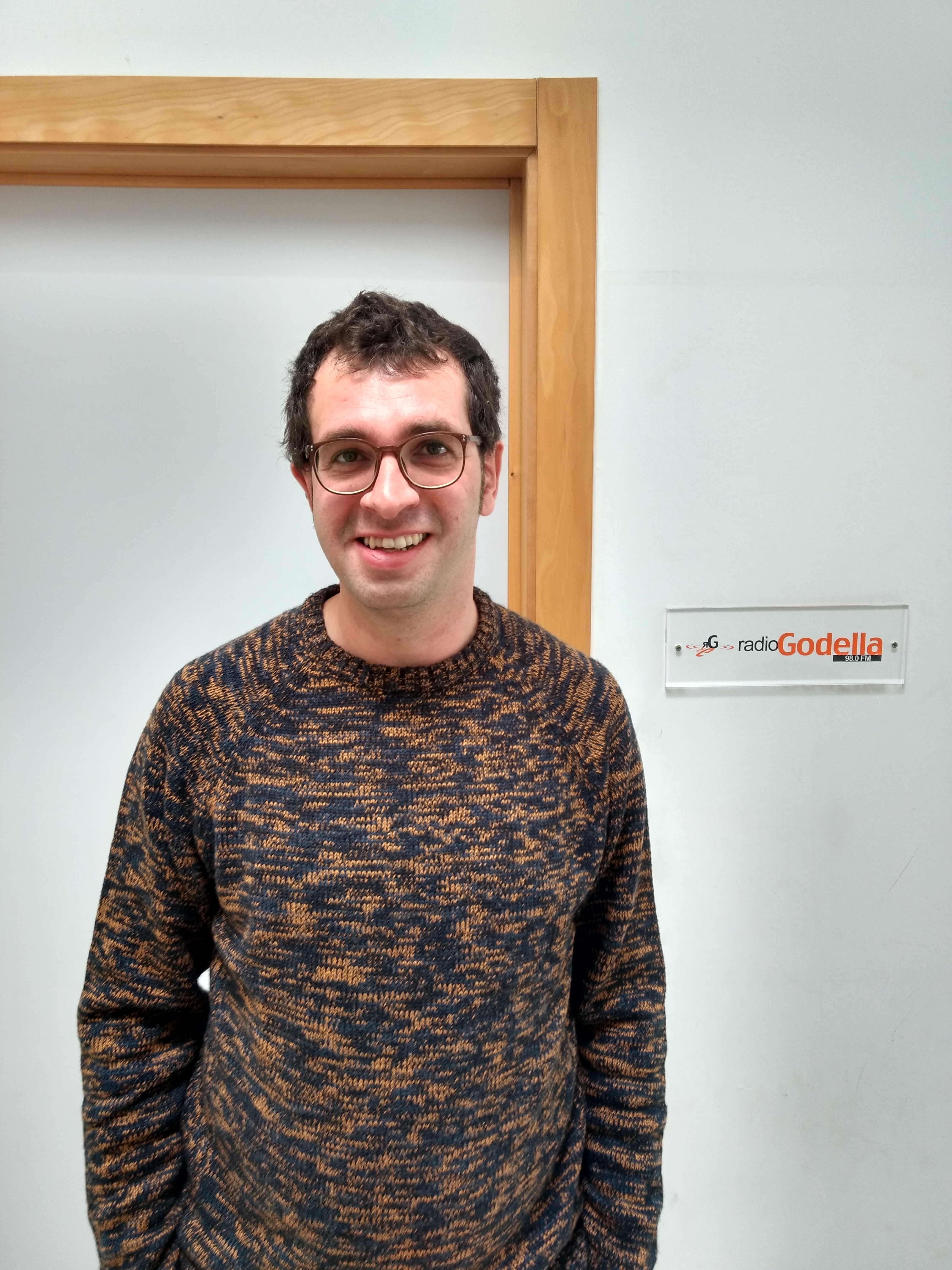 Paco Esteve i Beneito a La Represa